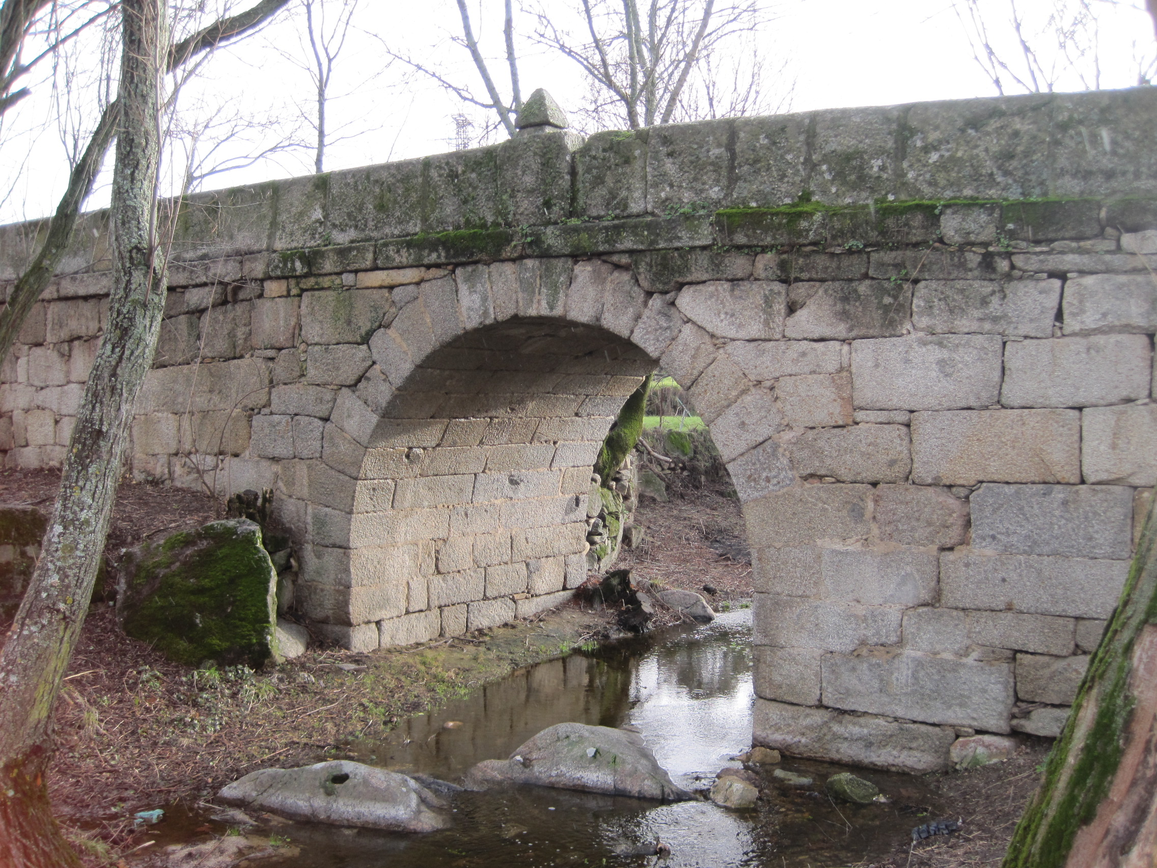 Puente de origen romano en la localidad de El Escorial (Madrid, España).